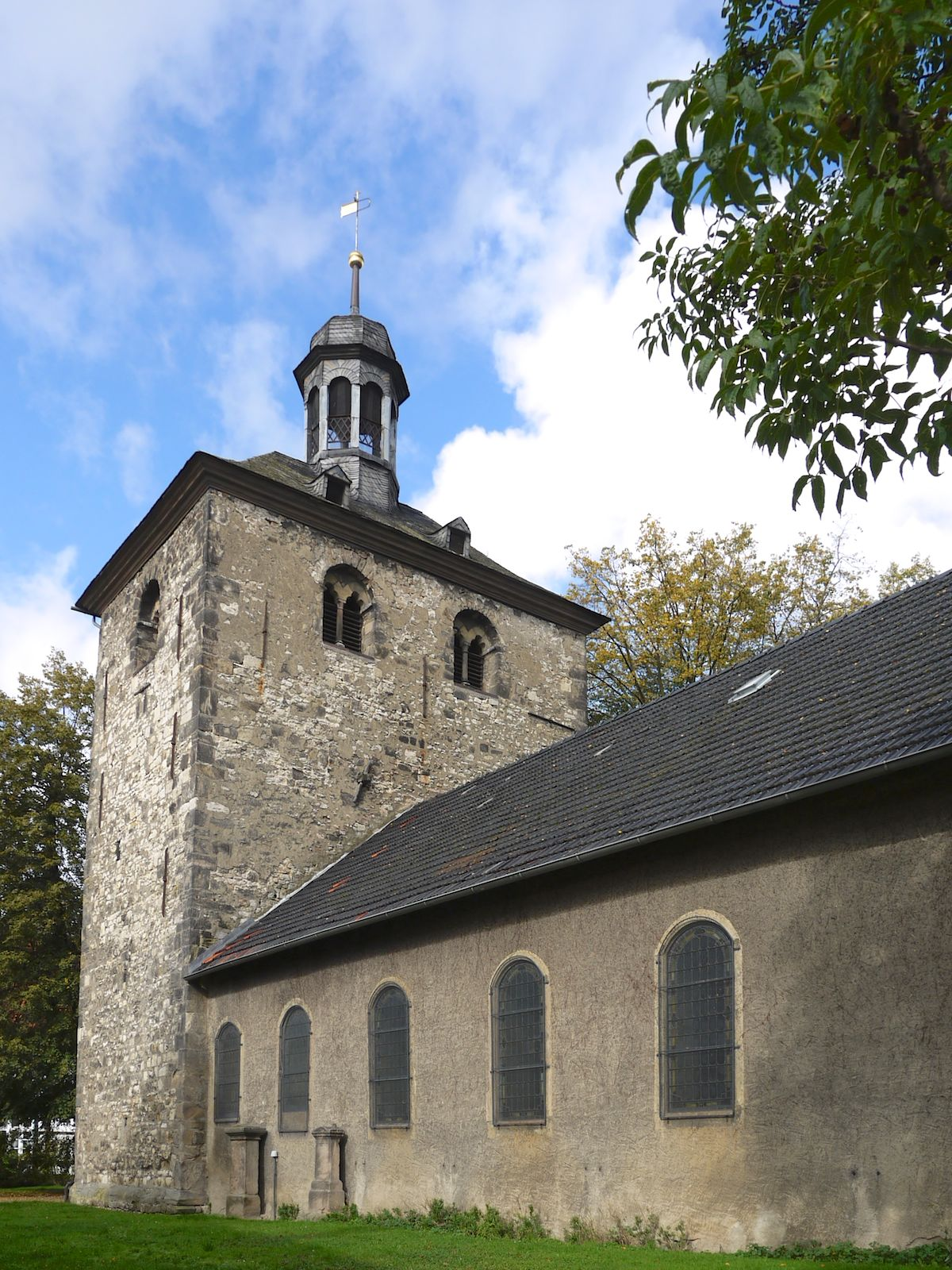 Evangelische Kirche St.-Johannis Baptista in Salzgitter-Ringelheim